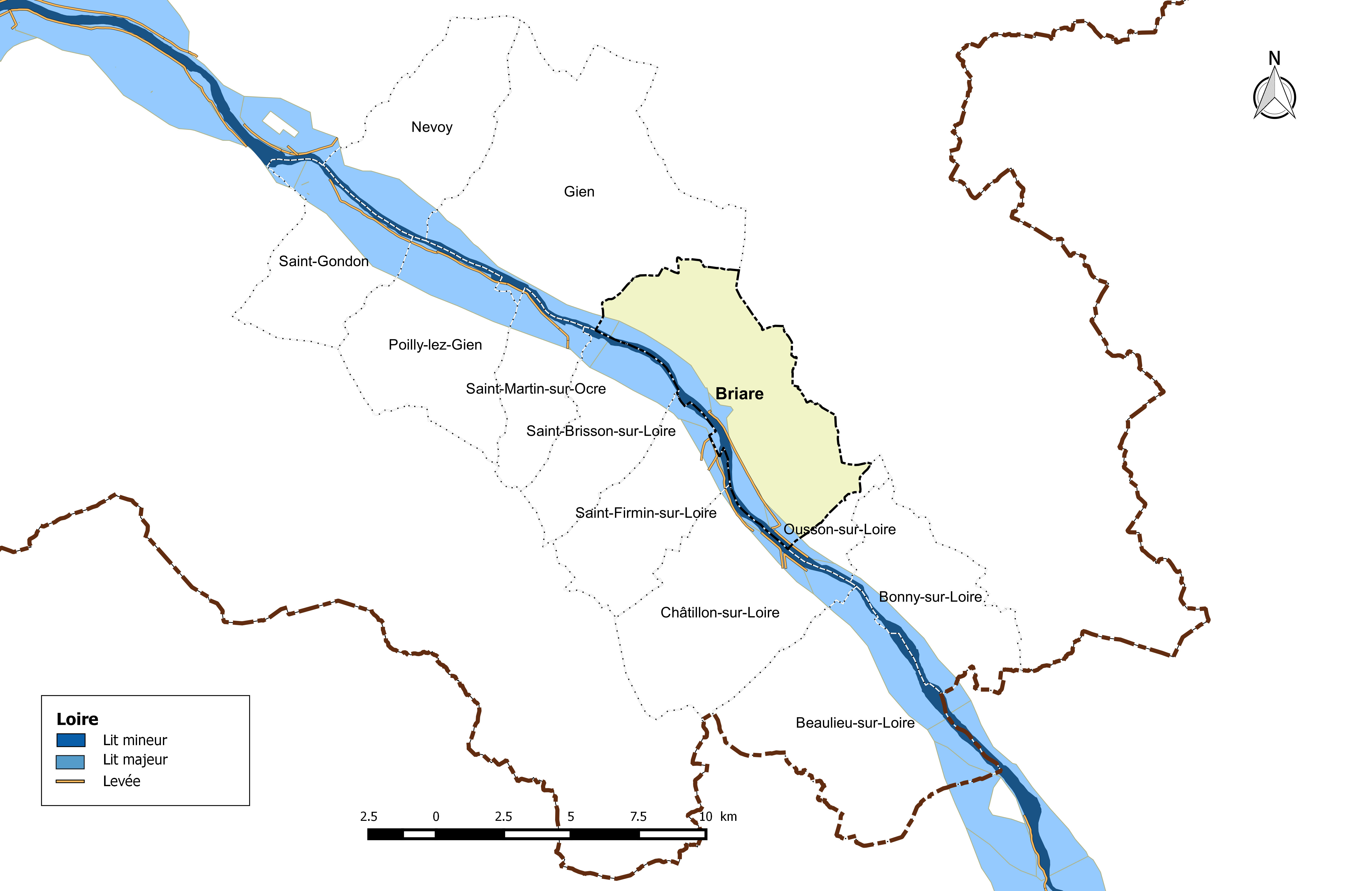 Vals du Giennois - Zone inondable liée à une crue de la Loire - Commune de Briare.